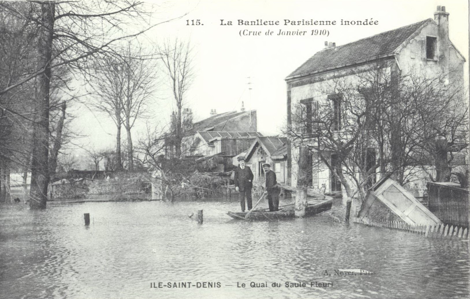 Carte postale ancienne édirée par Noyer, série "La banlieue parisienne innondée" de janvier 1910, N° 115 ÎLE-SAINT-DENIS - Le Quai du Saule Fleury